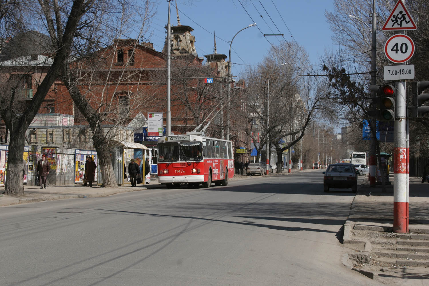 Саратов. Перекрёсток улицы Чернышевского и Бабушкиного взвоза